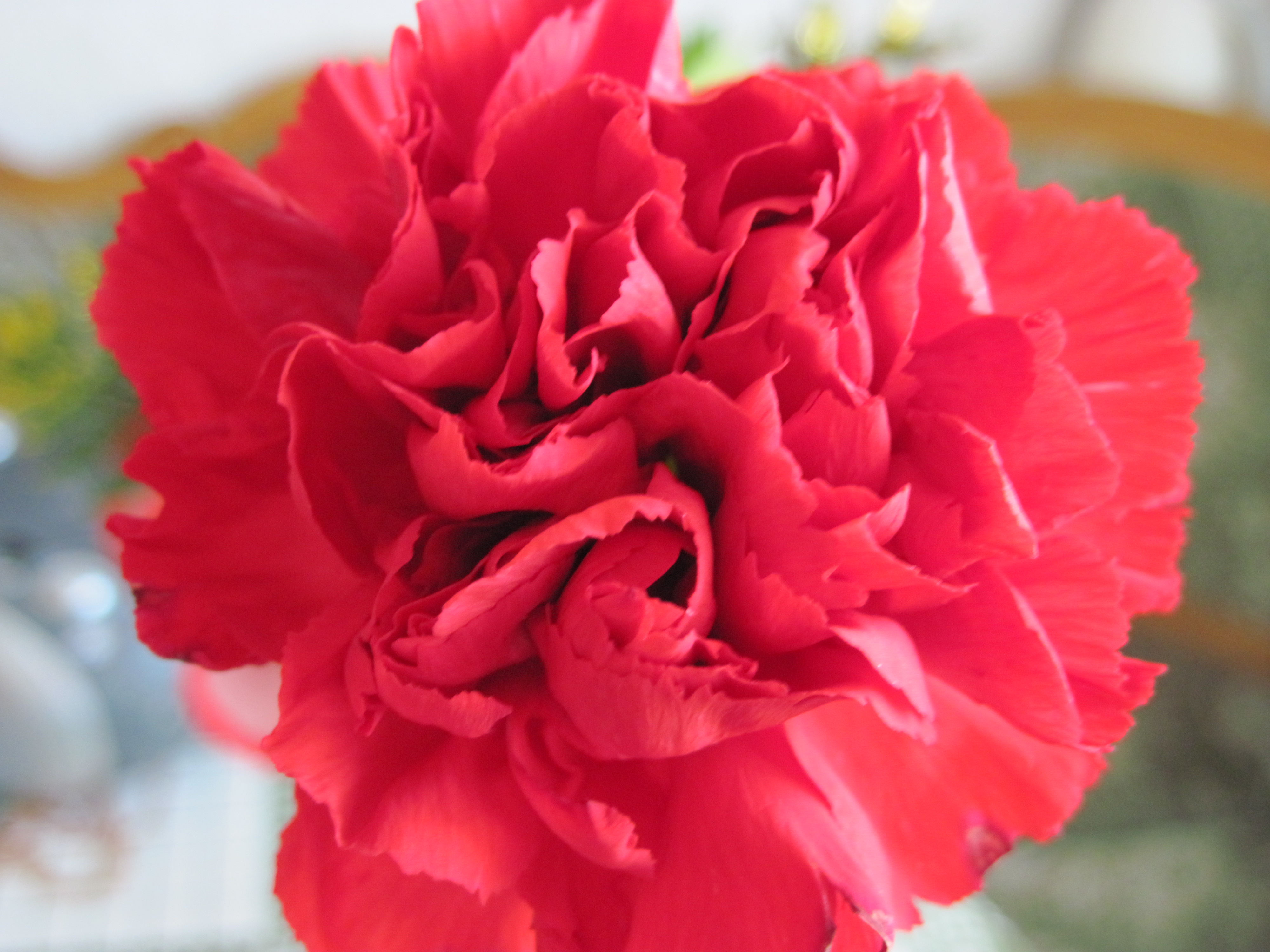 Россия